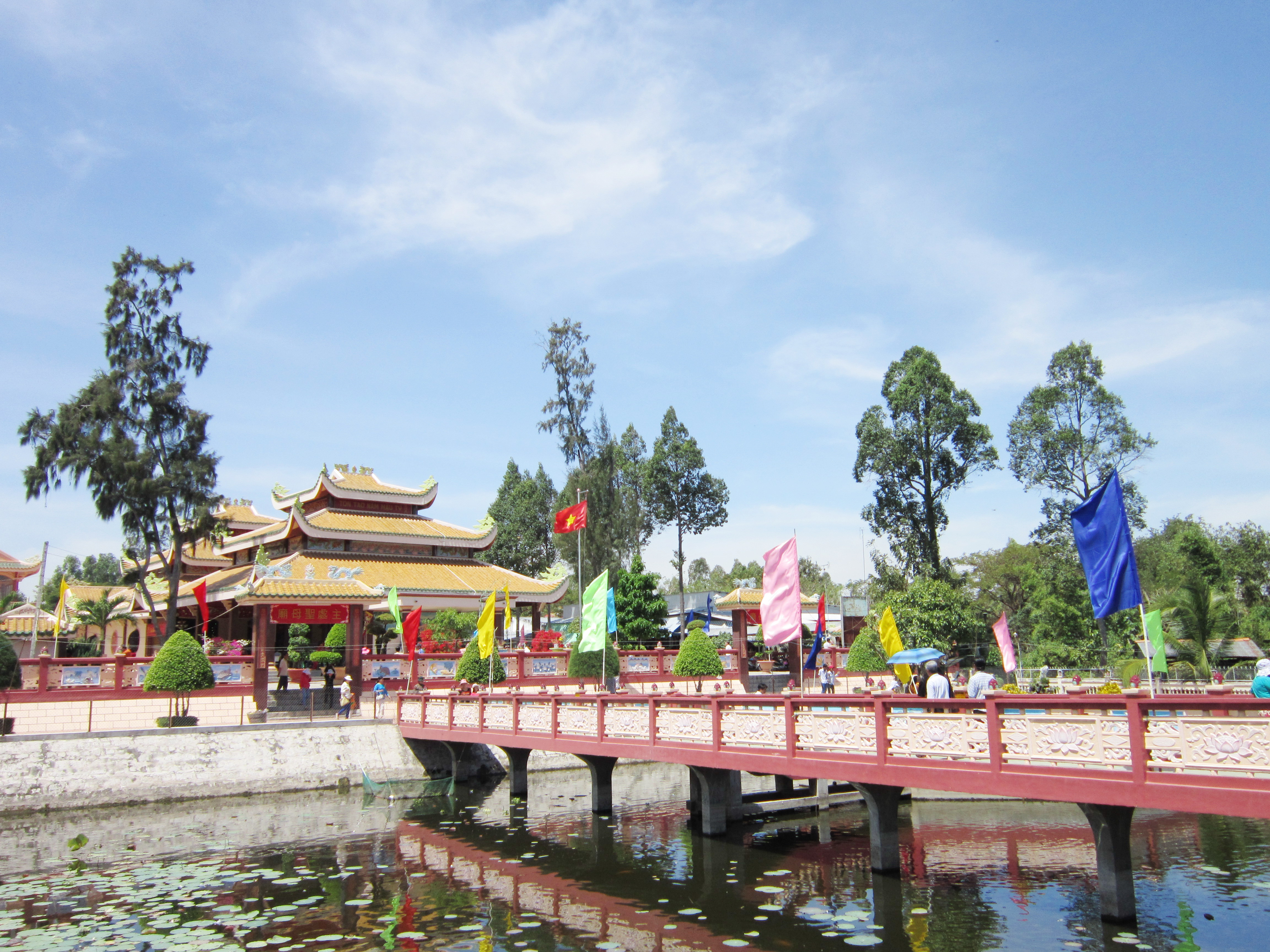 Toàn cảnh miễu Bà Chúa Xứ Bàu Mướp ở thị trấn Nhà Bàng, thuộc huyện Tịnh Biên, tỉnh An Giang, Việt Nam.